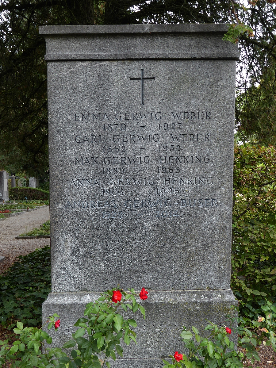 Max Carl Gerwig (1889–1965) Dr.jur., Universitätsprofessor. Grab auf dem Friedhof Wolfgottesacker, Basel